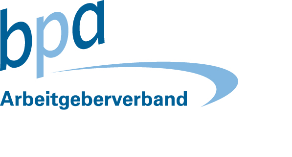 Das ist das Logo des bpa Arbeitgeberverand e.V.